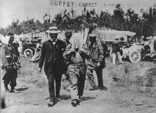 Ferenc Szisz after winning 1906 French Grand Prix